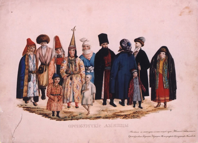 Description Литография "Оренбургские азиатцы" по рисунку с натуры Date1845Source Бибиков Литография "Оренбургские азиатцы" по рисунку с натуры